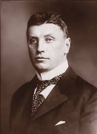 Bohumil Kučera (1874 - 1921), Český fyzik.